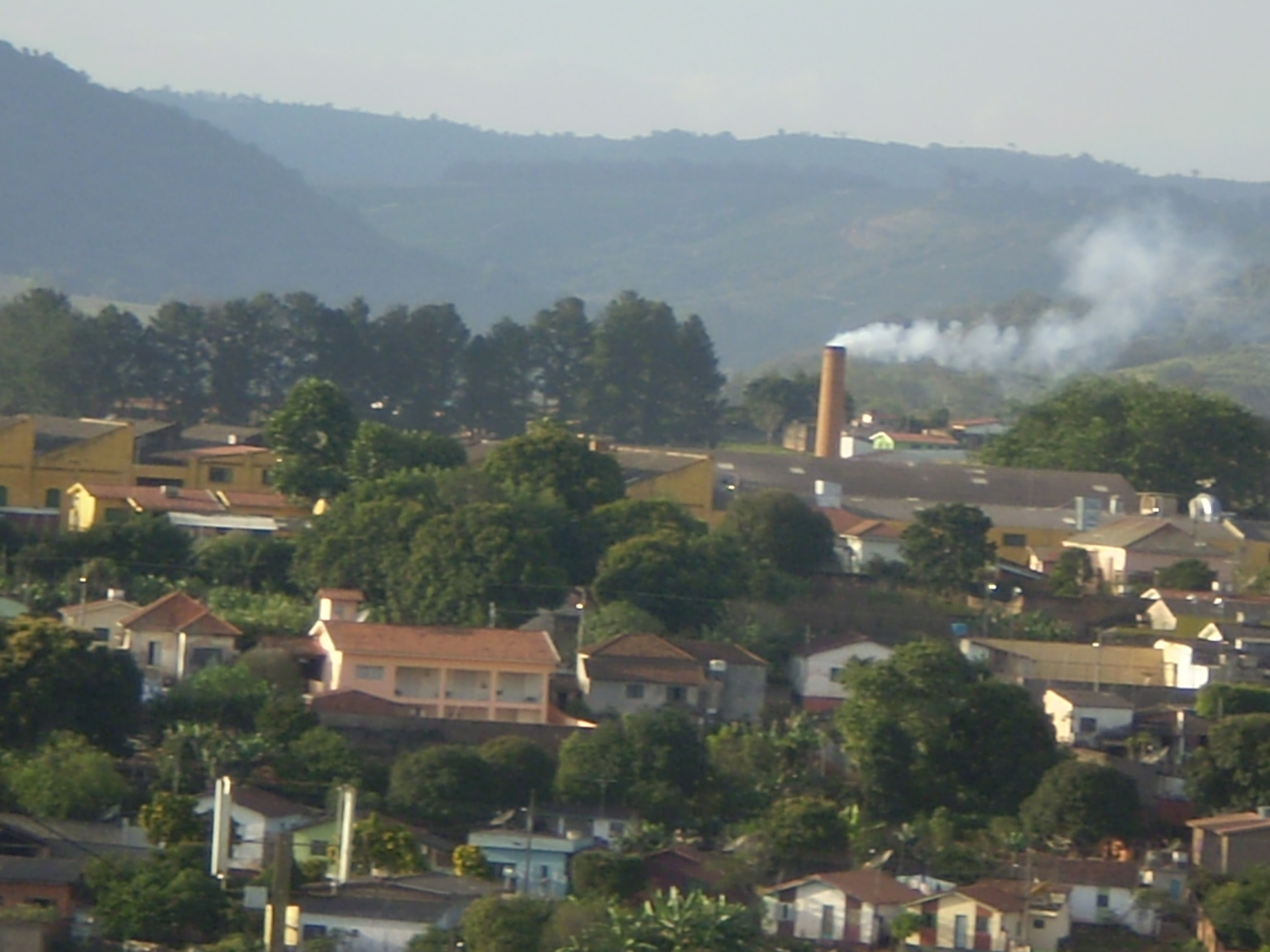 paisagem tipica